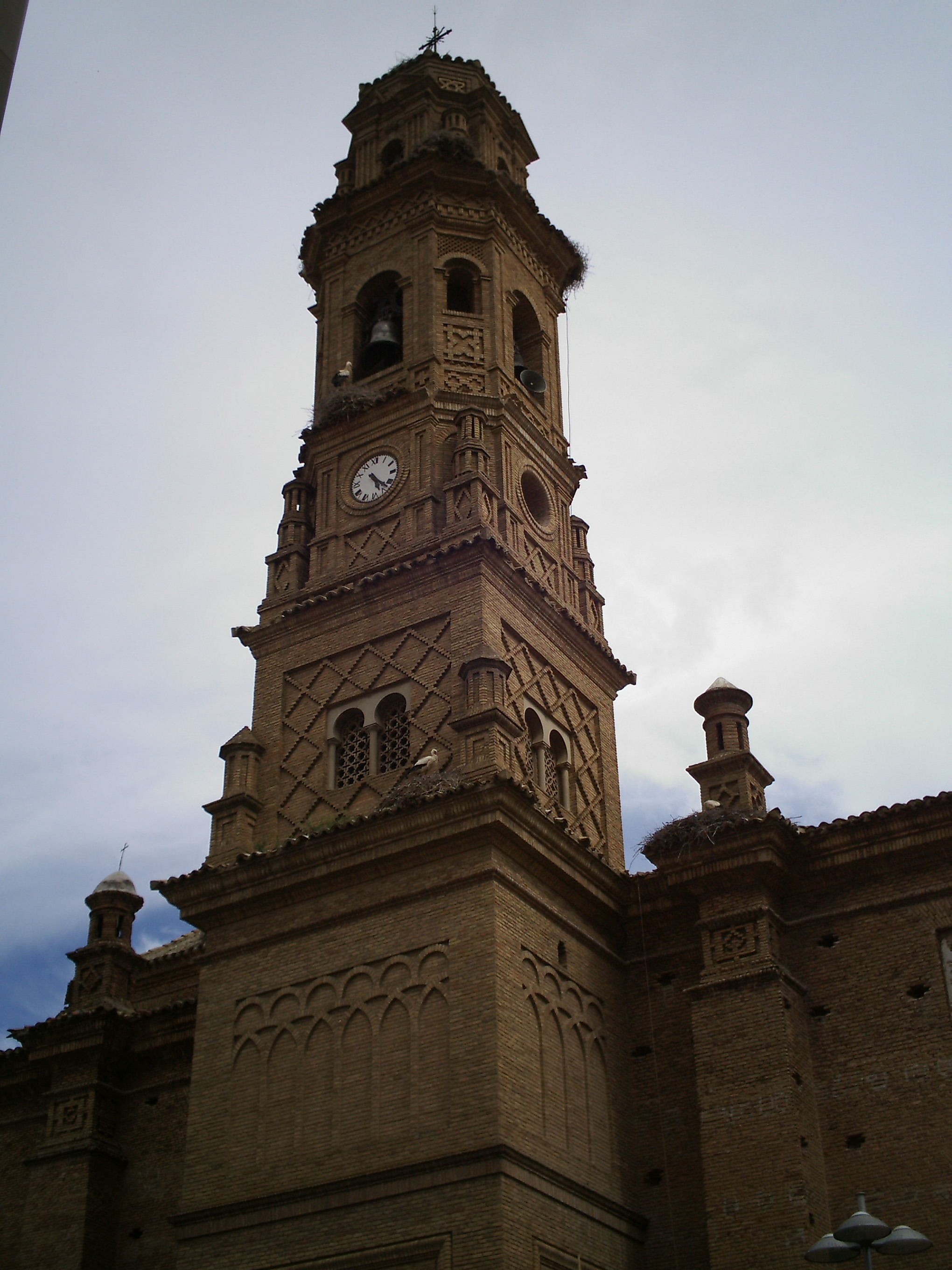 Iglesia de Nuestra Señora del Rosario en Corella, Navarra (España)